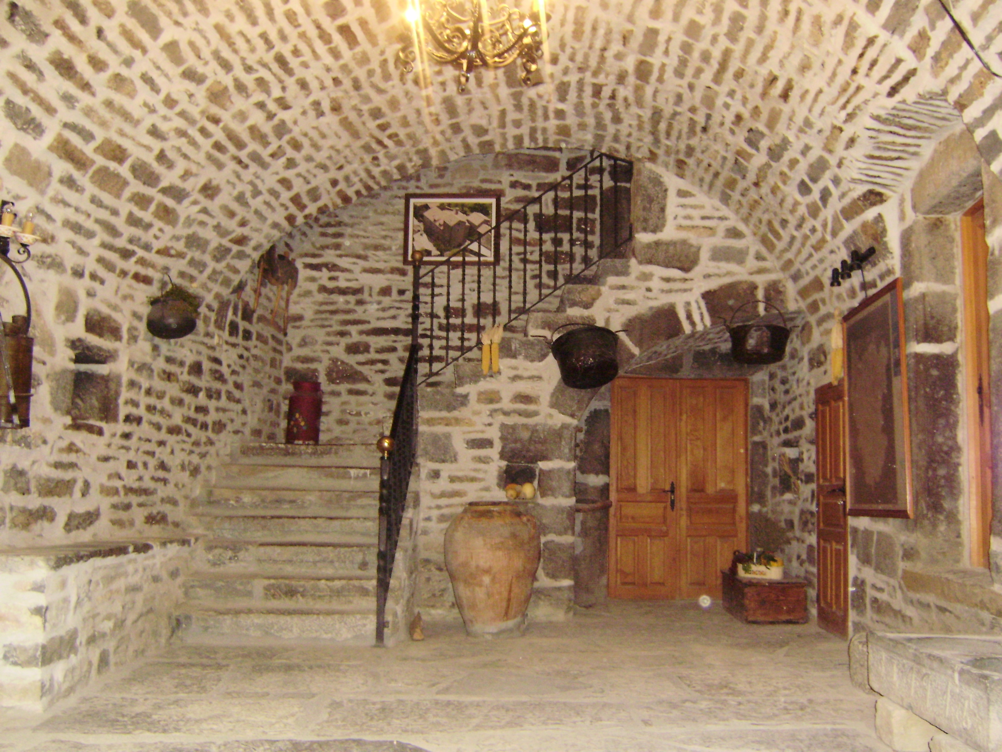 Patio interior decorado con útiles de labranza y demás enseres